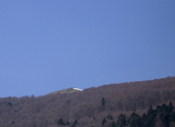 Le Klintzkopf, 1 330 m, vu depuis le Heidenfelsen